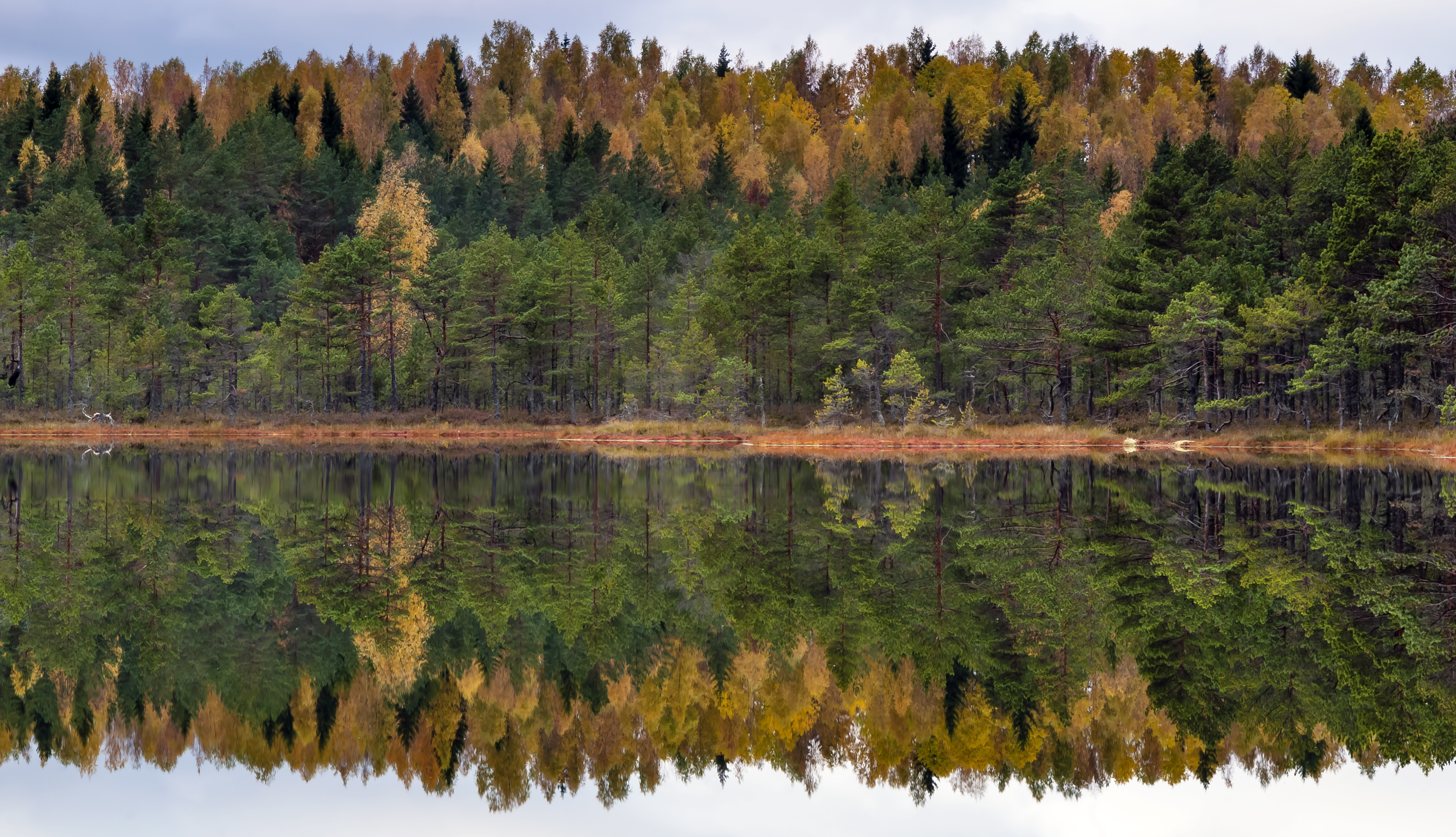 Umbjärv 74622 Harju maakond. Põhja-Kõrvemaa LKA, Jussi skv.